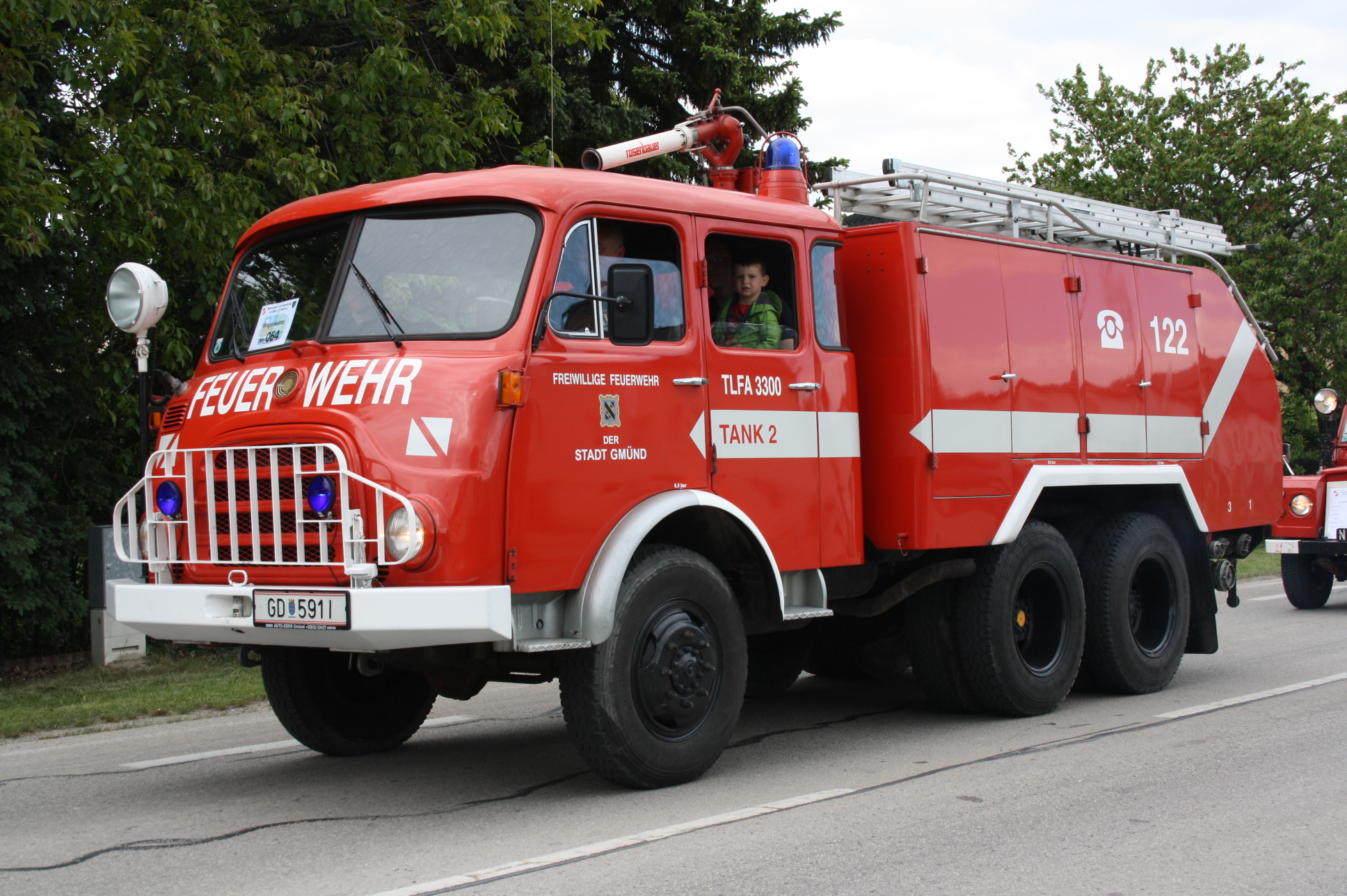 Einsatzfahrzeug der Feuerwehr Gmünd